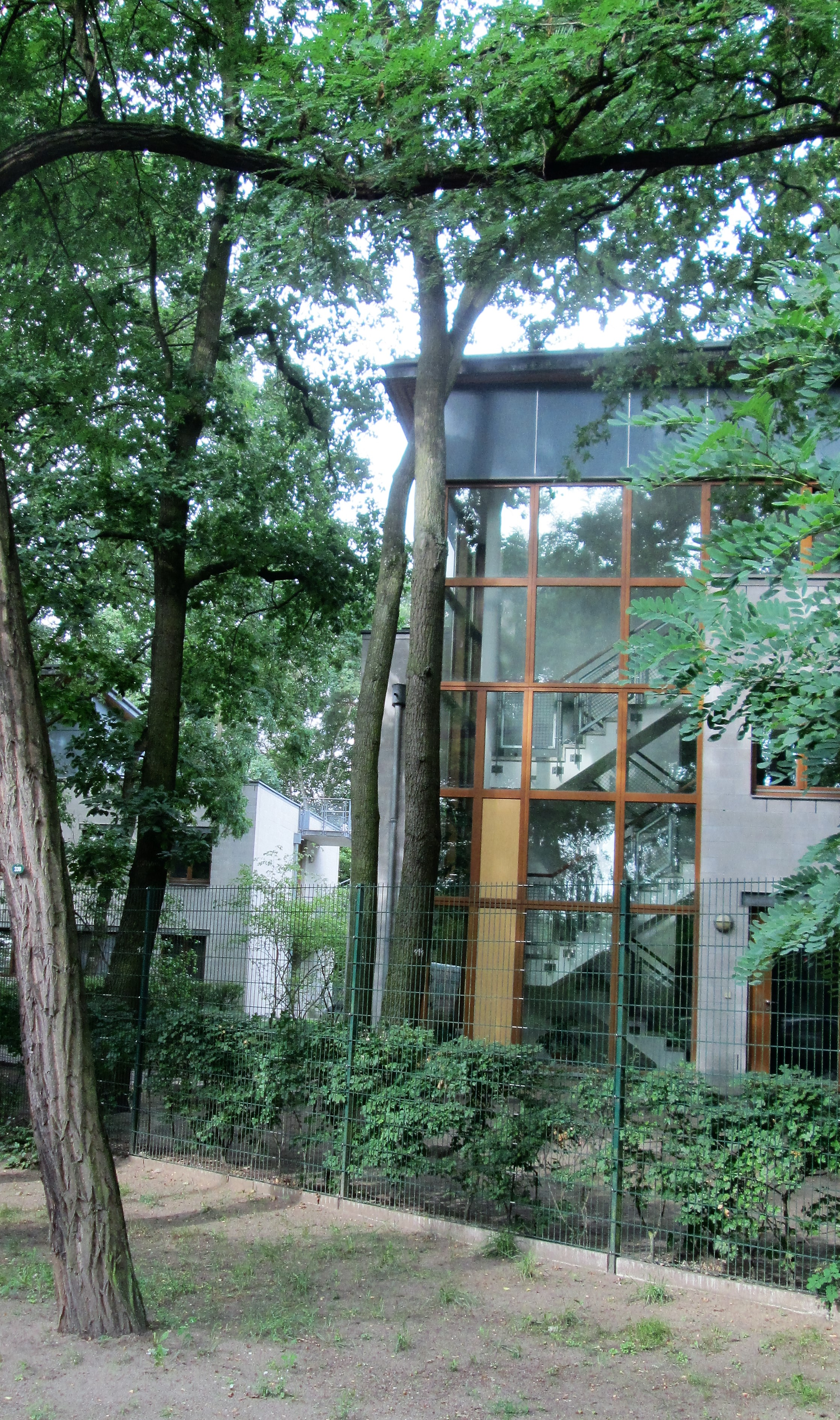 Justizvollzugsanstalt Berlin-Hakenfelde, Blick von Niederneuendorfer Allee